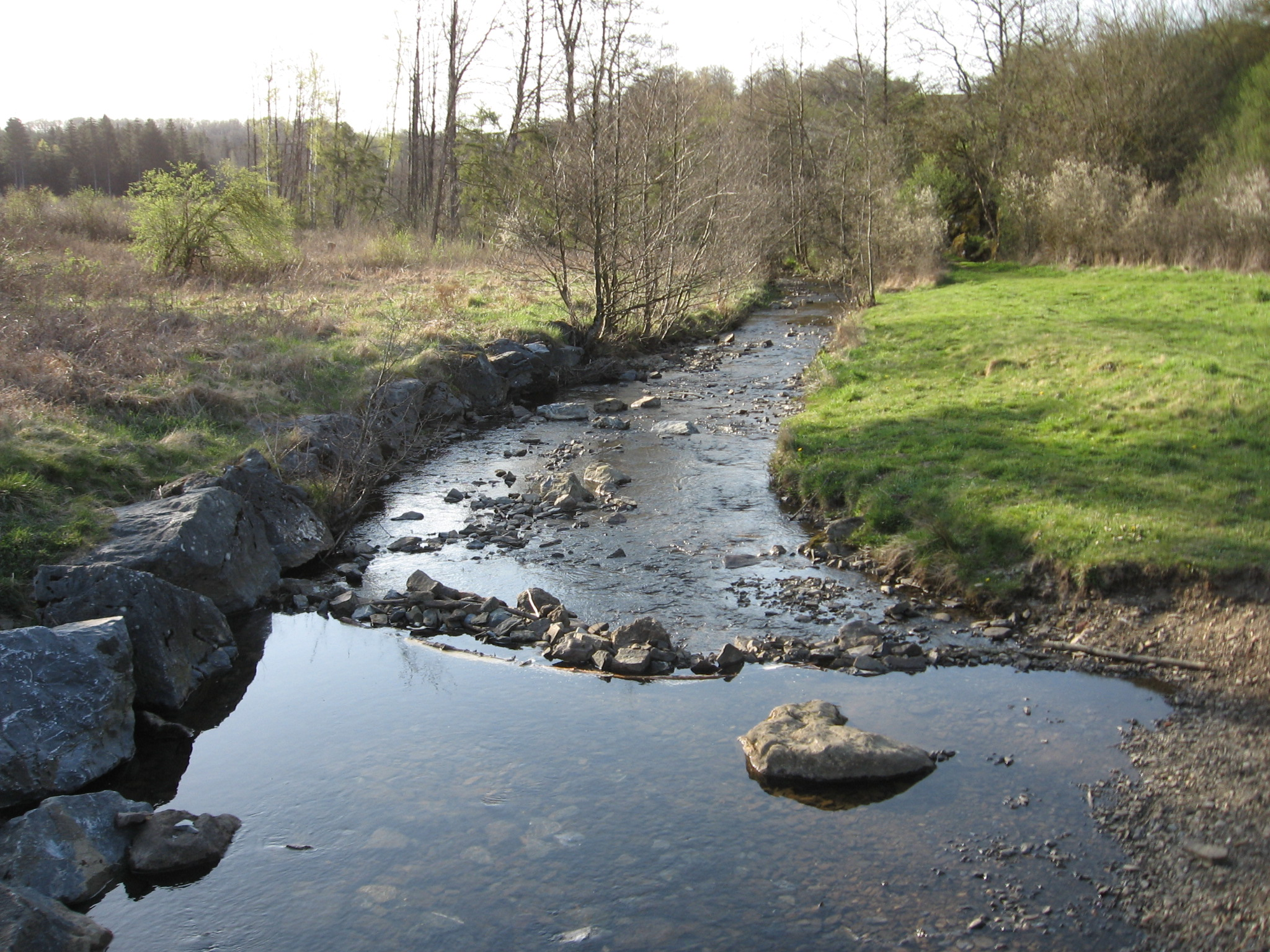 Lörmecke von der Brücke Höhe Hohler Stein Richtung Nord aufgenommen.